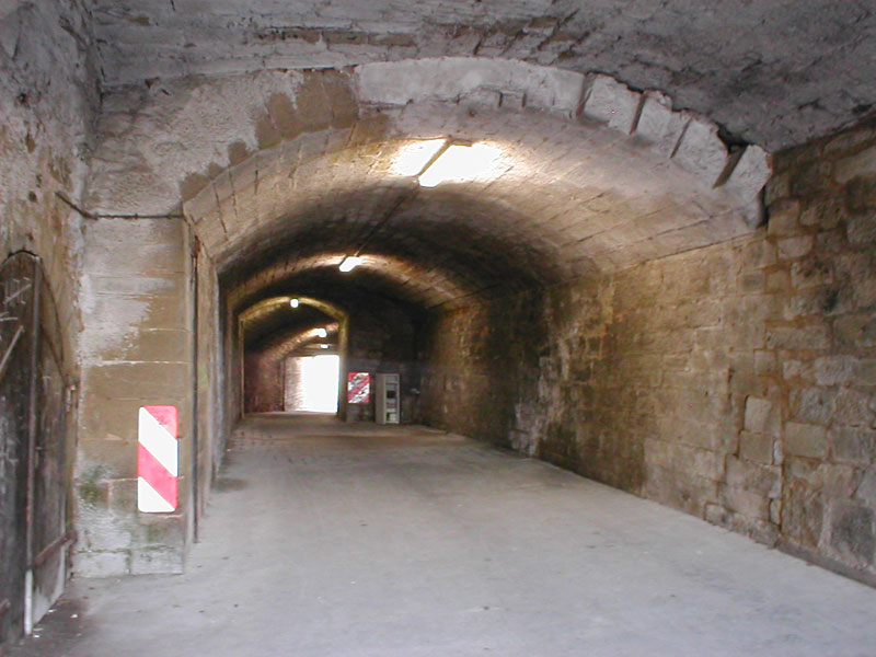 Grabengasse in Lauffen am Neckar, überbauter Stadtgraben, der einst für den Verkehr freigegeben war